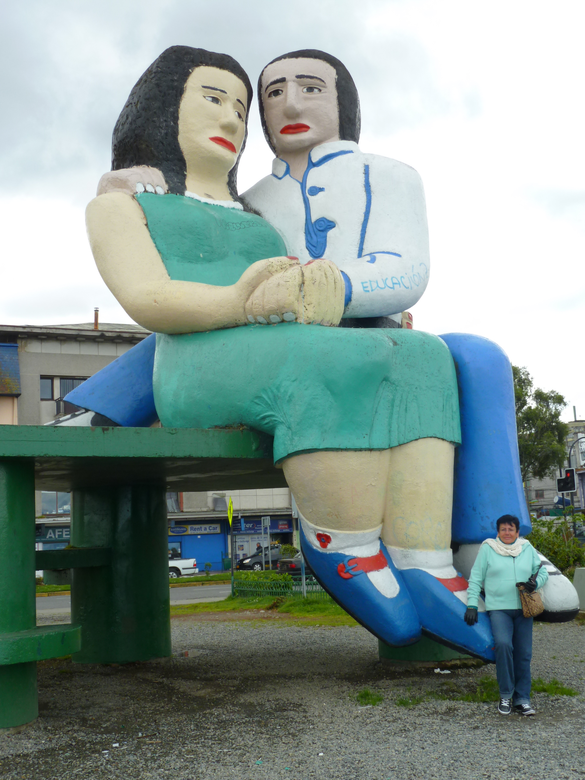 Escultura ubicada en la costanera de Puerto Montt This is a photo of a national monument in Chile: Enamorados Los Enamorados